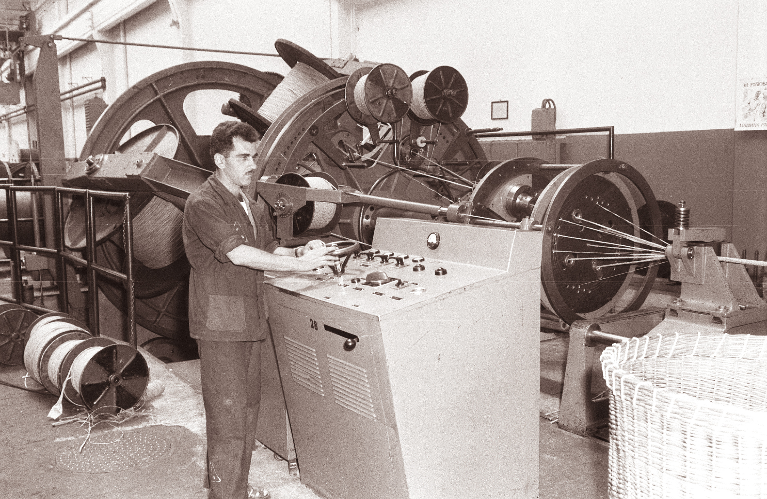 Tovarna kablov v Svetozarevu